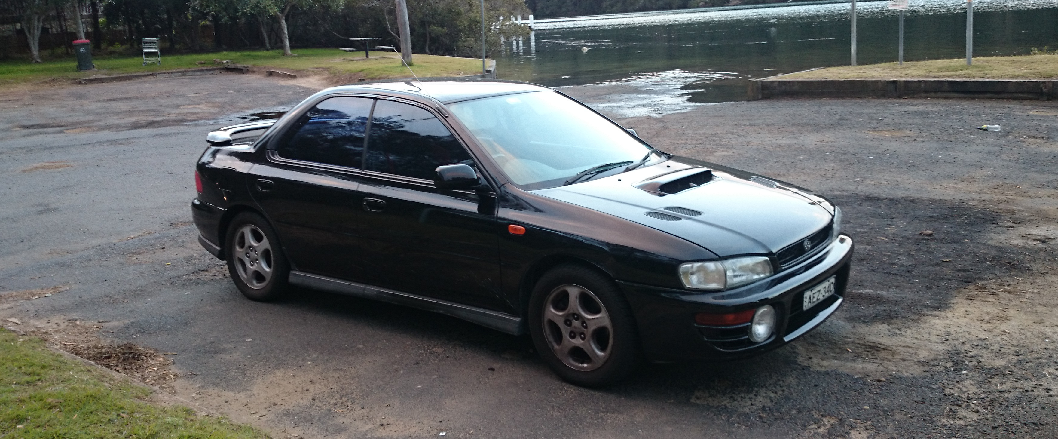 Subaru Impreza WRX